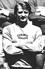 Title: Mannschaftsfoto BSG Chemie Böhlen Factual corrections and alternative descriptions are encouraged separately from the original description. Additionally errors can be reported at this page to inform the Bundesarchiv. Original historic description: ADN-ZB-Kluge-10.8.82-zin-Bez. Leipzig: BSG Chemie Böhlen - Aufsteiger zur Fußball-Oberliga für die Spielserie 1982-83. Durch den ersten Rang in der Aufstiegsrunde gelang der BSG Chemie Böhlen in diesem Jahr wieder der Sprung in die höchste Spielklasse der DDR. Hintere Reihe v.l.n.r.: Mannschaftskapitän Klaus Havenstein, Roland Hammer, Rainer Srodecky, Horst Kunze, Lothar Höhne und Rolf Tröger. Mittlere Reihe v.l.n.r.: Bernd Hubert, Manfred Zaspel, Torhüter Freimuth bott, Torhüter Klaus Herber, Bodo Gladrow und Rainer Wolf. Vordere Reihe v.l.n.r.: Gunter Amler, Olaf Adamczak, Friedhelm Schneider und Klaus Bittner. Es fehlen Detlev Müller und Christian Kalainski.